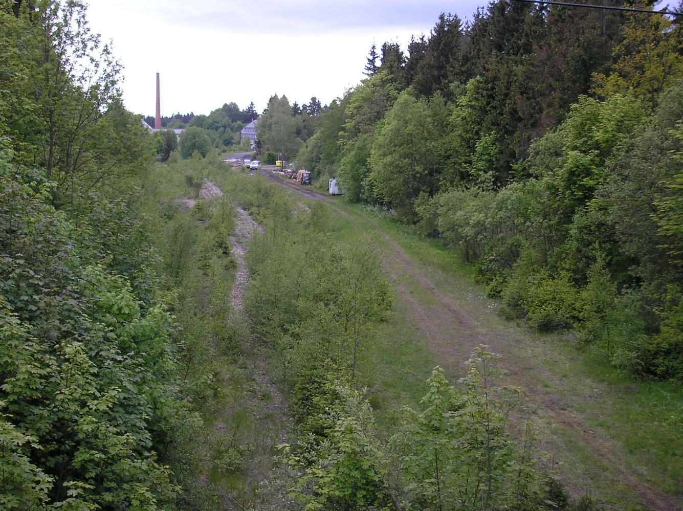 Blick in den stillgelegten Bahnhof Neustadt-Gillersdorf bei Großbreitenbach (Thüringen).